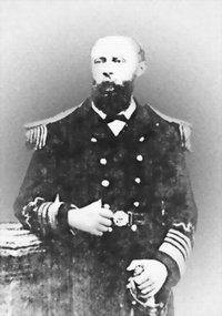 琅威理（英語：William M Lang，1843年1月19日－1906年12月15日），大英帝國海軍上校，曾兩度擔任清朝北洋水師總查。